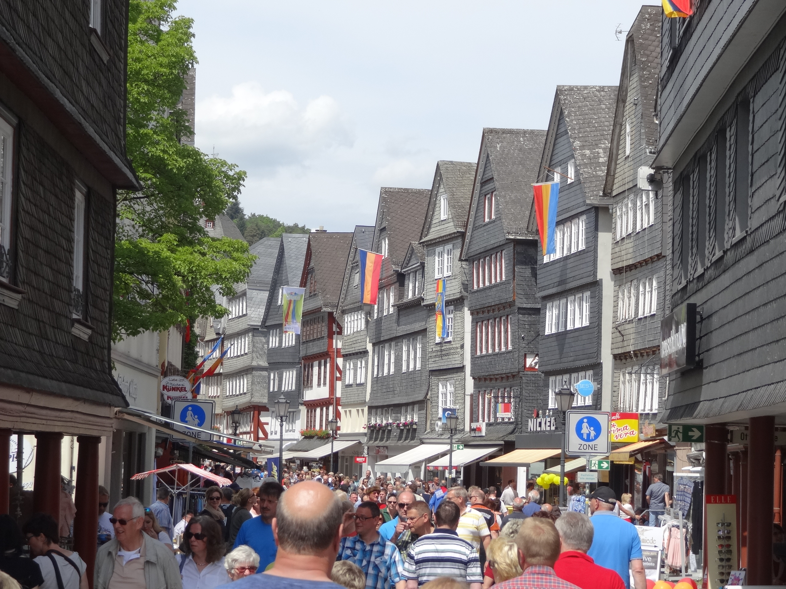 Hauptstraße (Herborn) Hessentag 2016